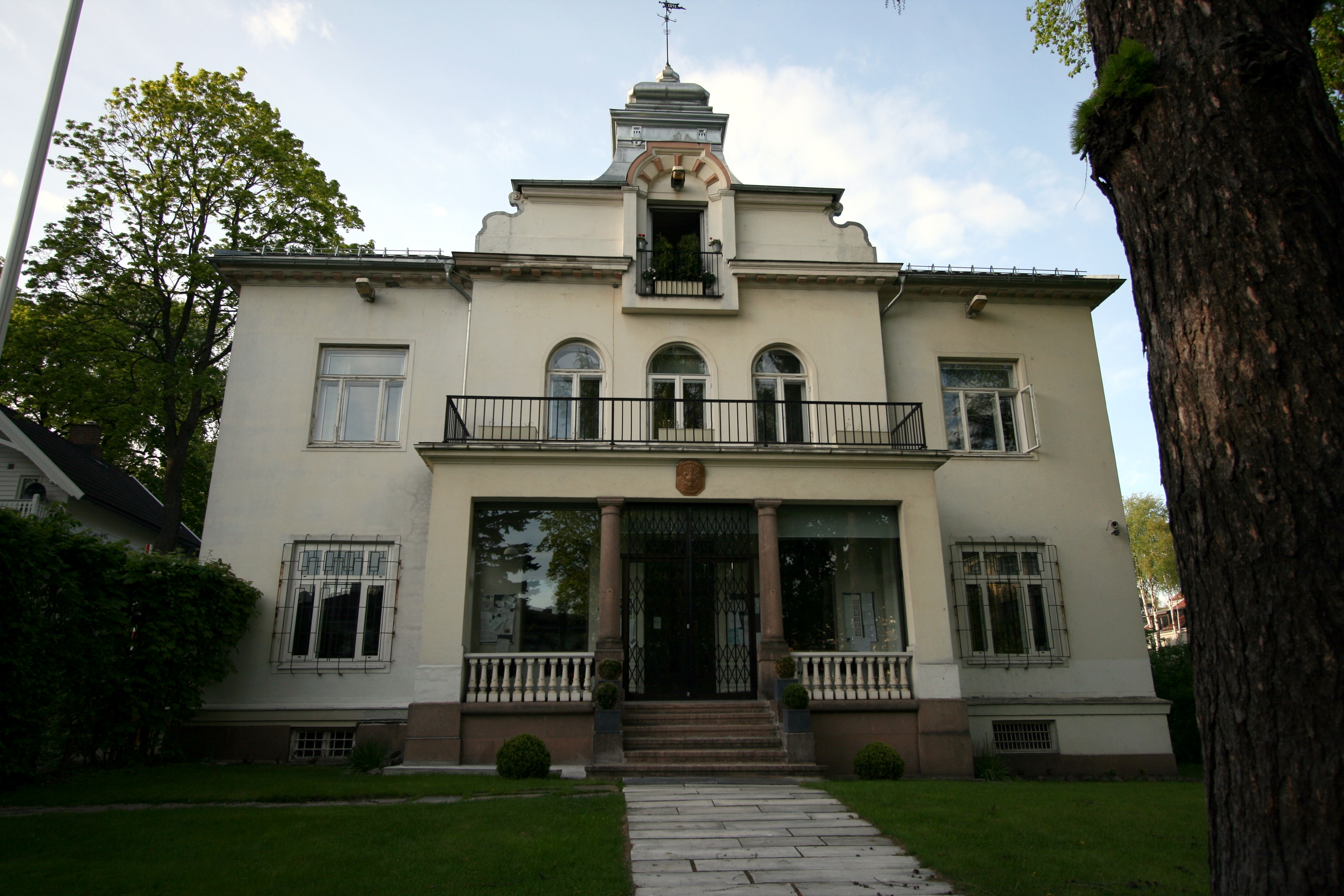 Frankrikes ambassade. Nybarokk villa oppført 1891 ved arkitekt Chr. Reuter.